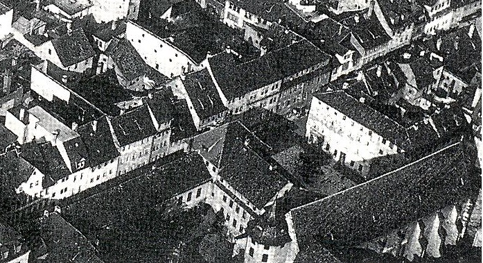 Teilansicht der Gebäude des ehemaligen Collegium Jenense (vorher Dominikanerkloster) mit der Kollegienkirche (vorher Dominikanerkirche St. Paulus), um 1920